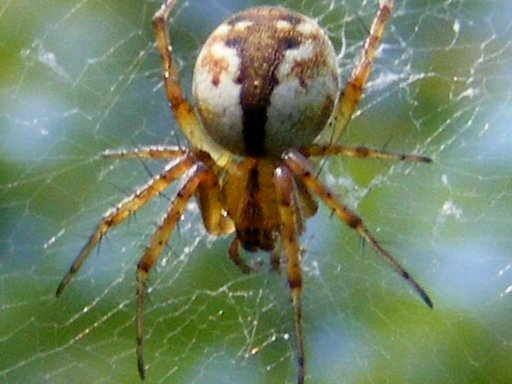 Mangora placida : Photographiés dans la région montréalaise les 7 juin et 7 juillet 2011, sur Fujifilm FinePix S700.